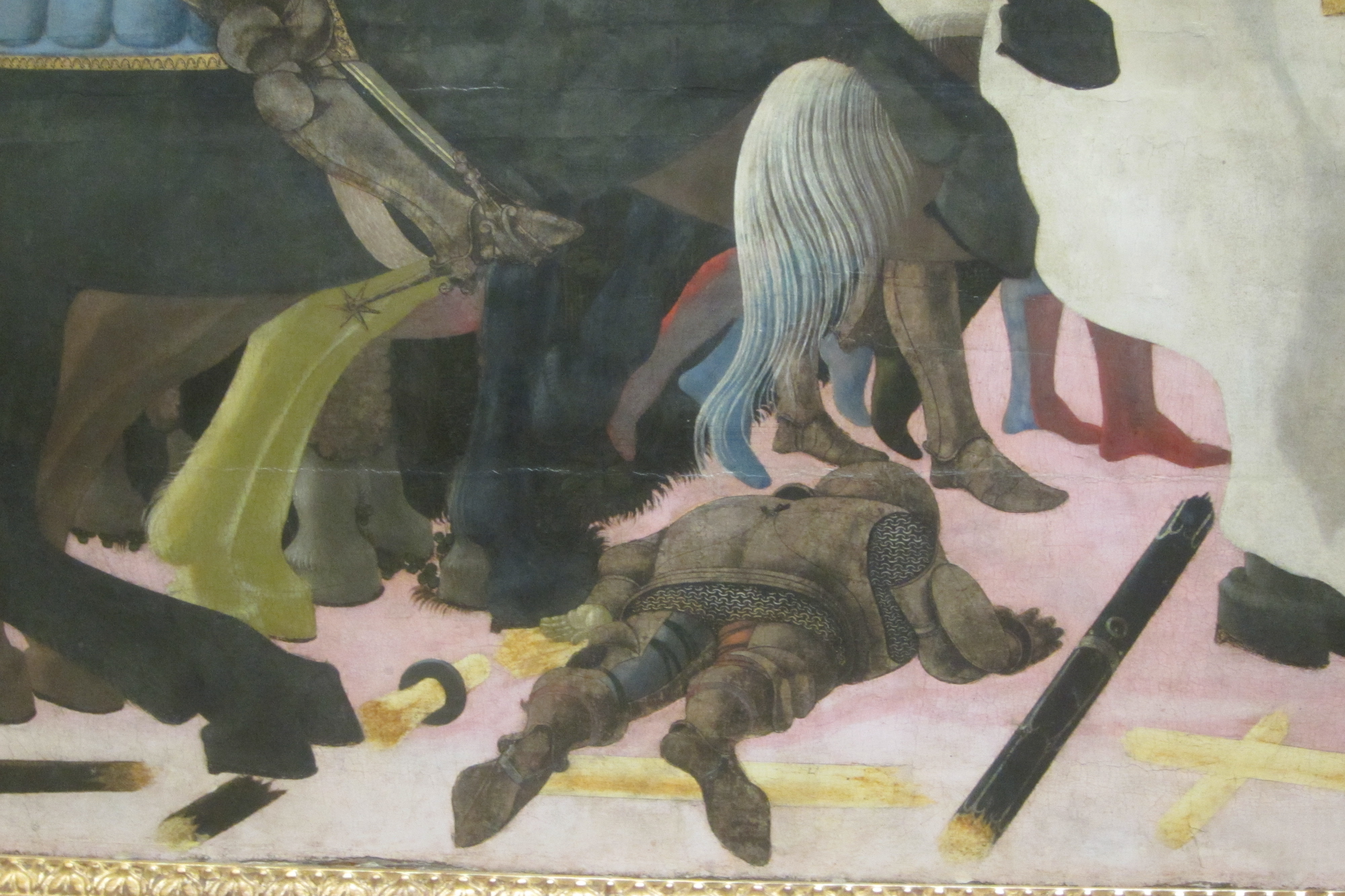 Detail schilderij De Slag bij San Romano, P. Uccello, 1432